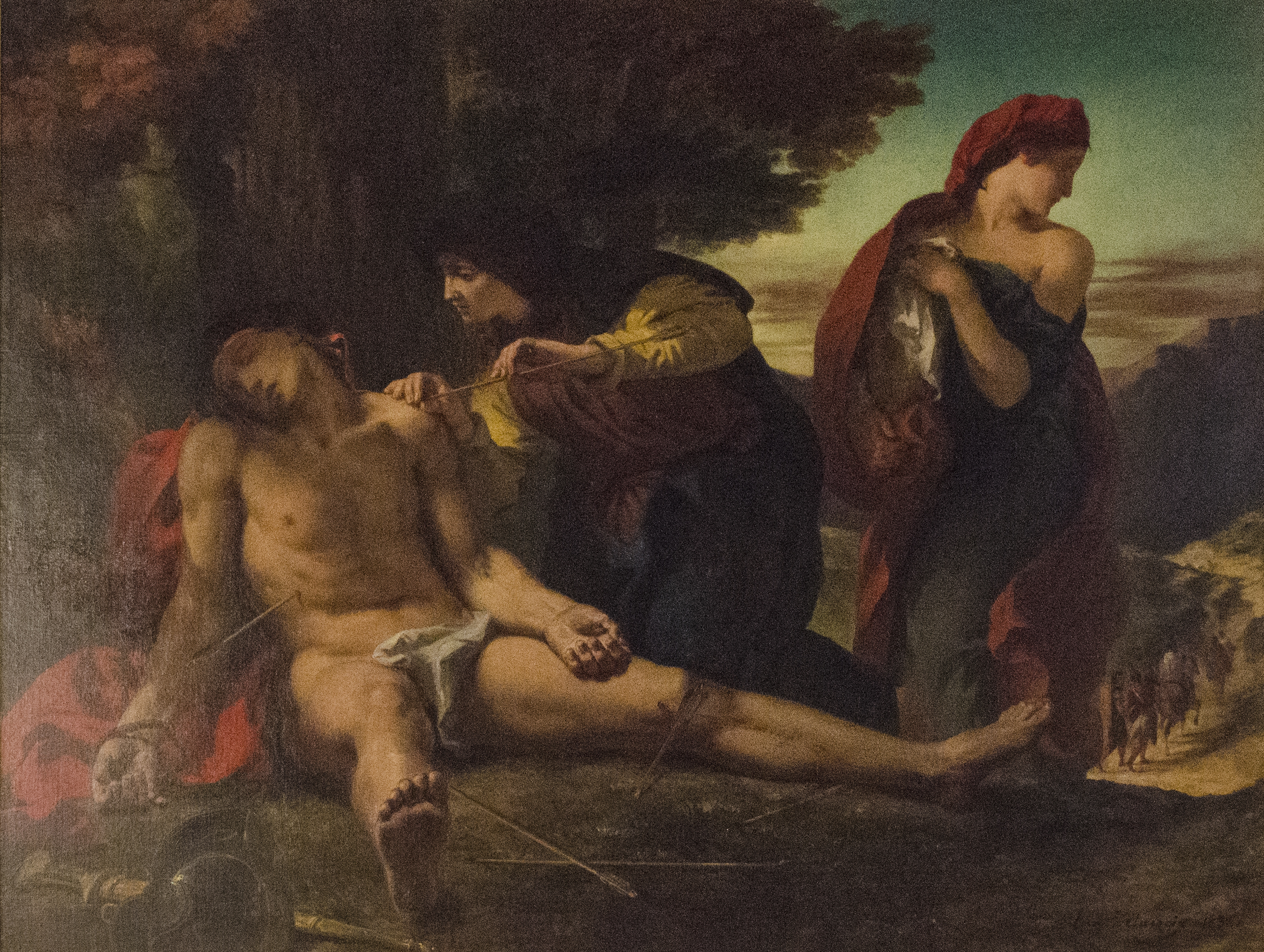 Le Martyre de saint Sébastienlabel QS:Lfr,"Le Martyre de saint Sébastien"